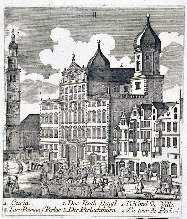 Rathaus, aus: G. H. Kayser: Die Schönheiten der Königl. Kreisstadt Augsburg und deren Umgebungen. Jenisch und Stage, Augsburg und Leipzig ohne Jahr (ca. 1818).